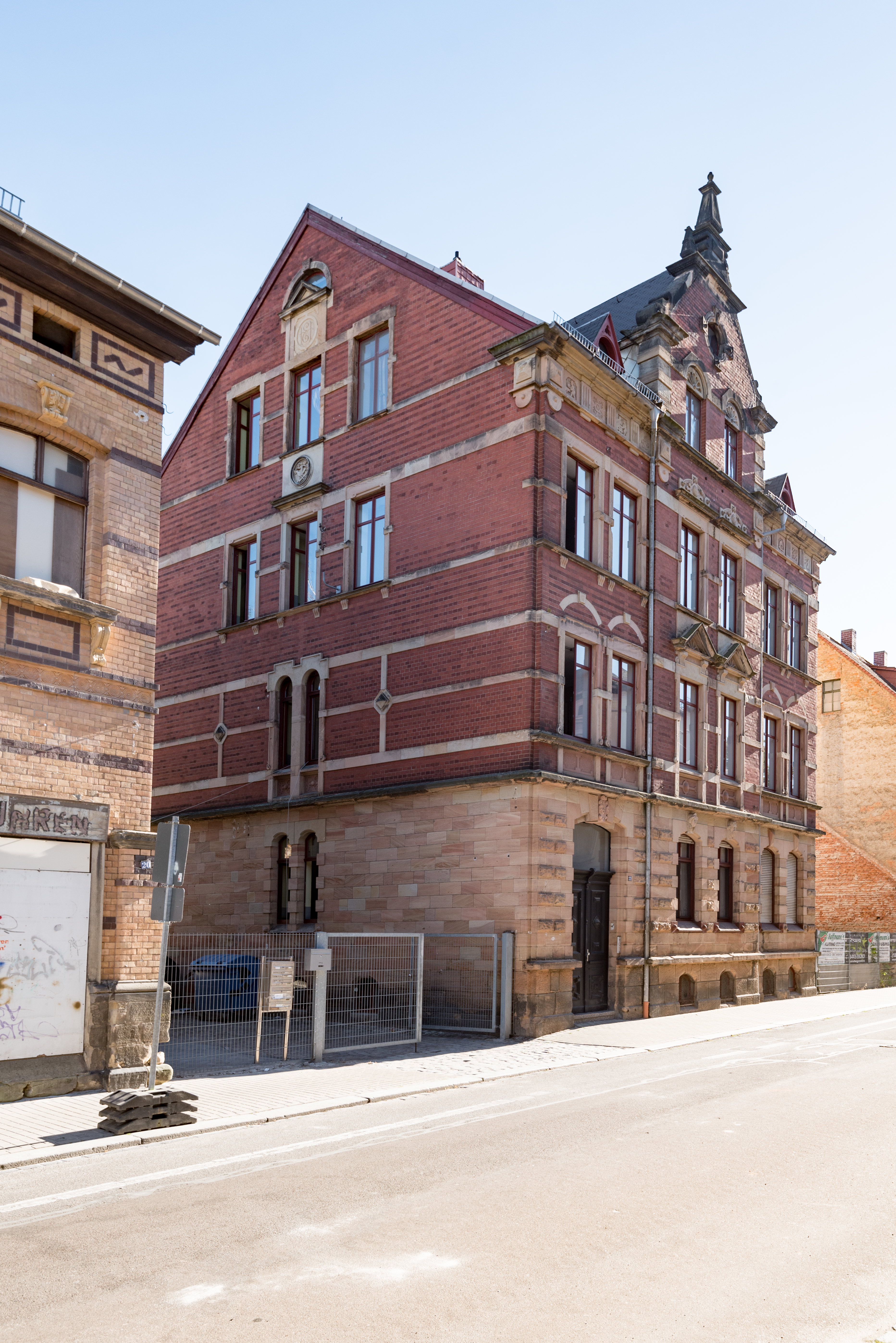 Weißenfels, Beuditzstraße 22